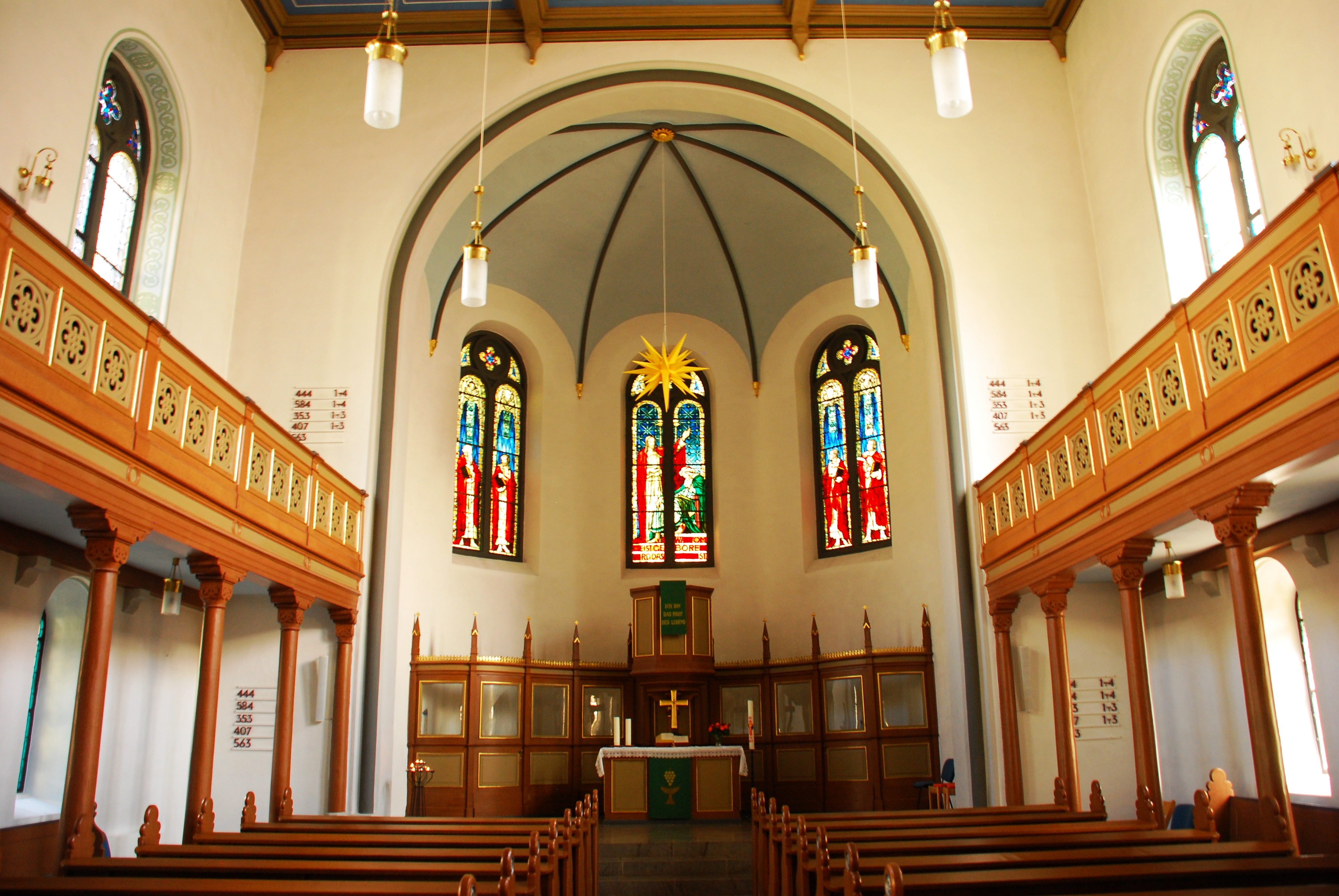 Altarbereich der evangelischen Kirche in Sankt Goarshausen, Rhein-Lahn-Kreis, Rheinland-Pfalz. Als Denkmal im nachrichtlichen Verzeichnis der Kulturdenkmäler Rhein-Lahn-Kreis aufgeführt.